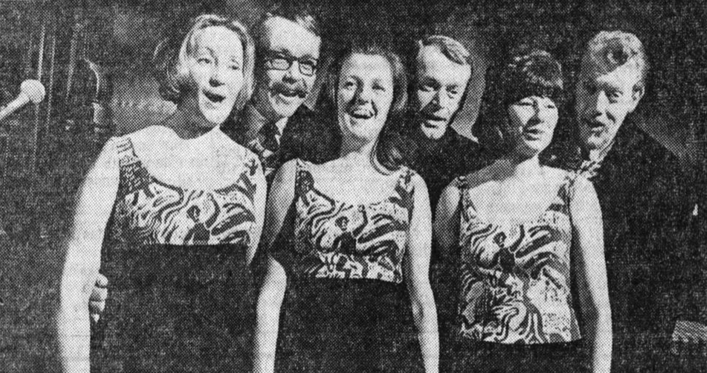 Gals and Pals (1966?). Från vänster: Pia Lang, Lasse Bagge, Ulla Hallin, Beppo Gräsman, Kerstin Bagge och Svante Thuresson.